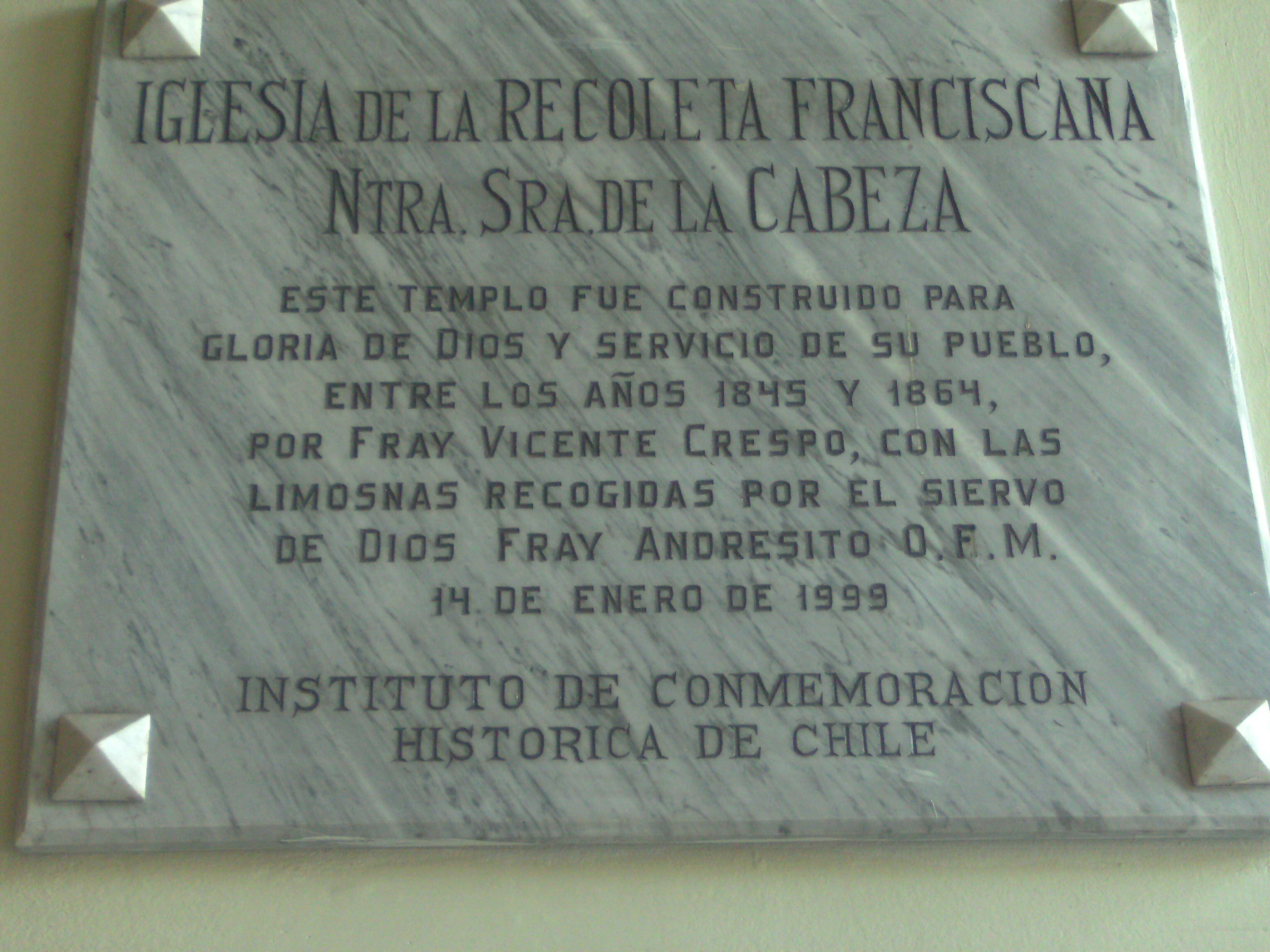 Iglesia y convento de la Recoleta Franciscana en el barrio Patronato y Vega central. This is a photo of a national monument in Chile: 215